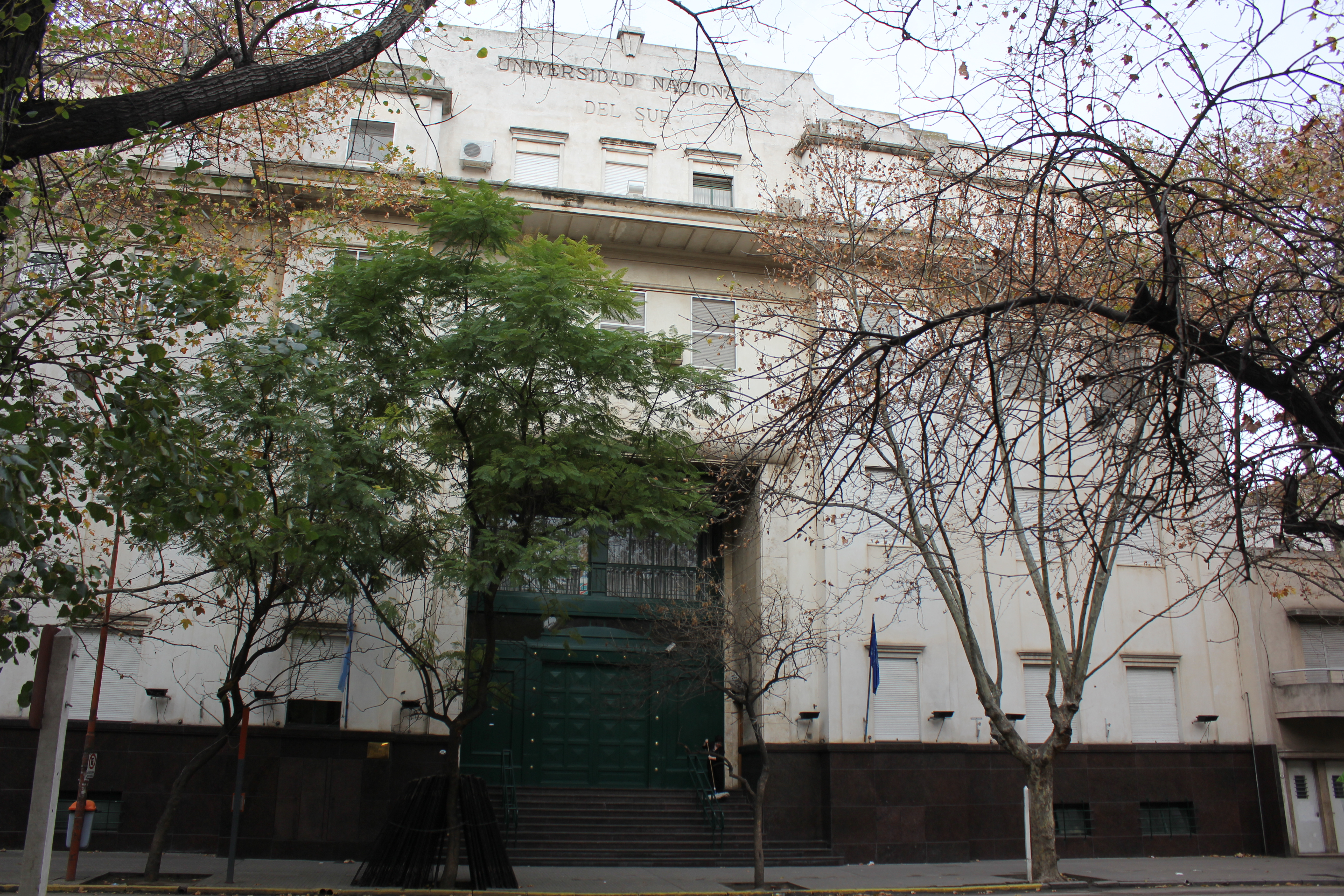 Sede del Rectorado de la Universidad Nacional del Sur, en Bahía Blanca, Buenos Aires, Argentina. Anteriormente fue sede del Instituto Tecnológico del Sur, organismo que dió origen a dicha universidad.